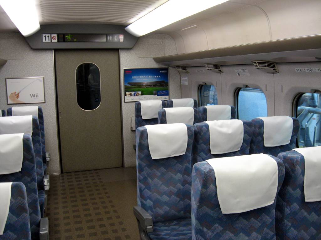 車椅子スペース 新幹線700系電車 C編成 11両目